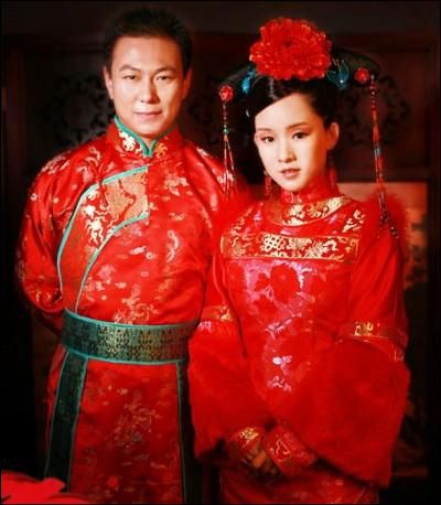 fête